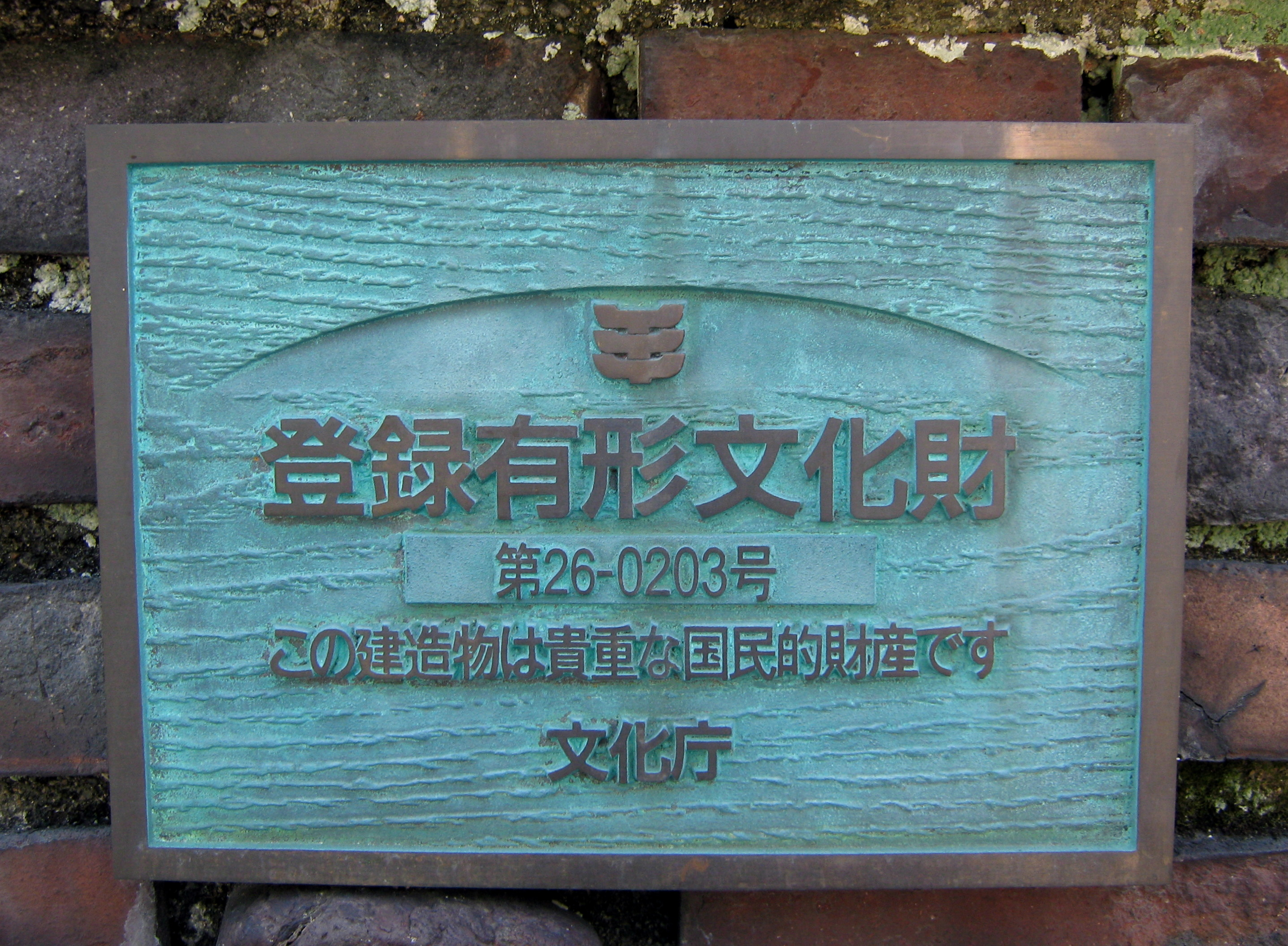 Kennzeichnung eines registrierten materiellen Kulturgutes in Japan